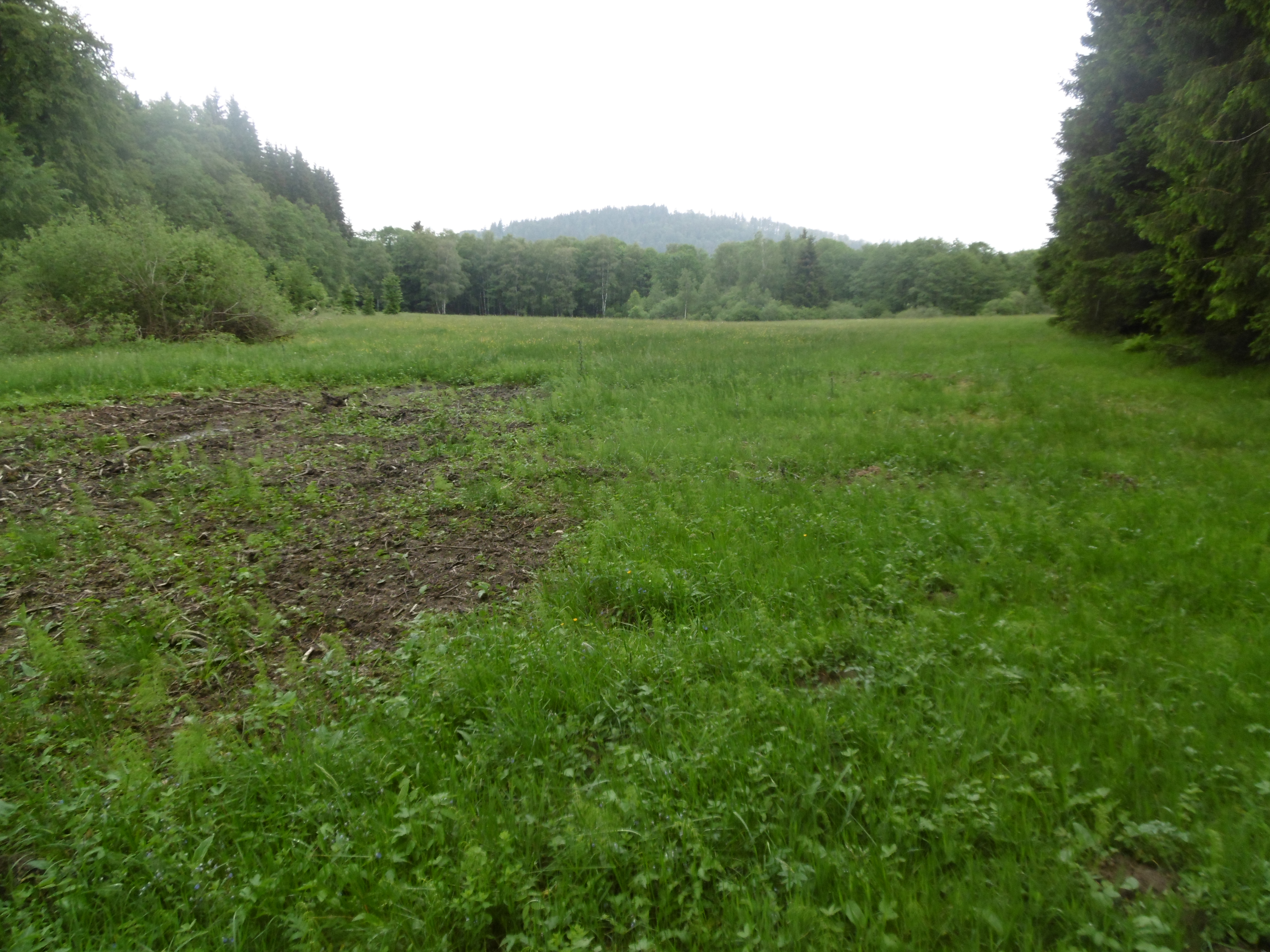 Naturschutzgebiet Gutmecke und Renau von Südwesten.